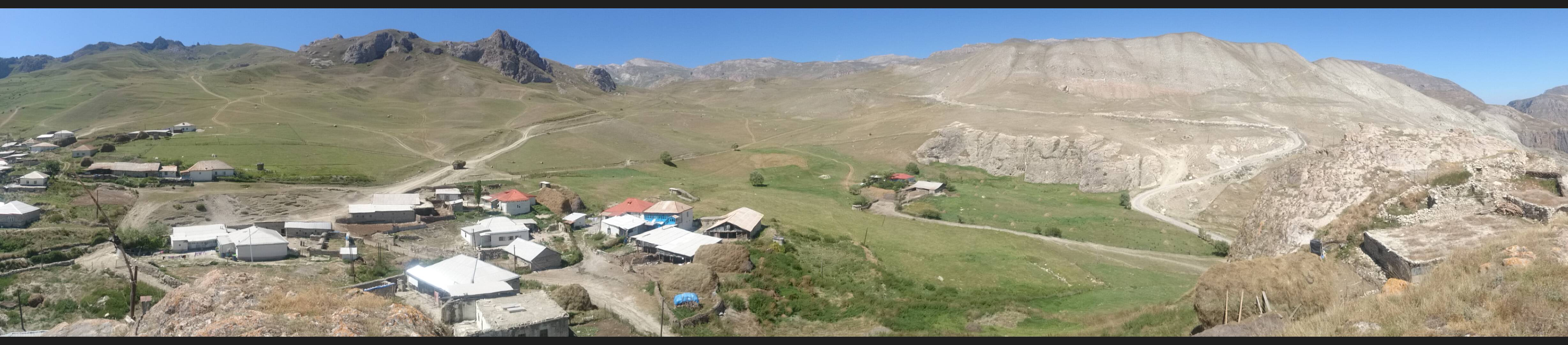 Cek kəndi